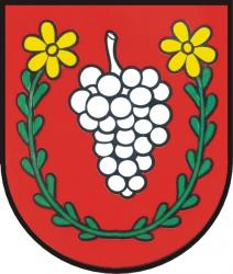 erb Velke Zaluzie